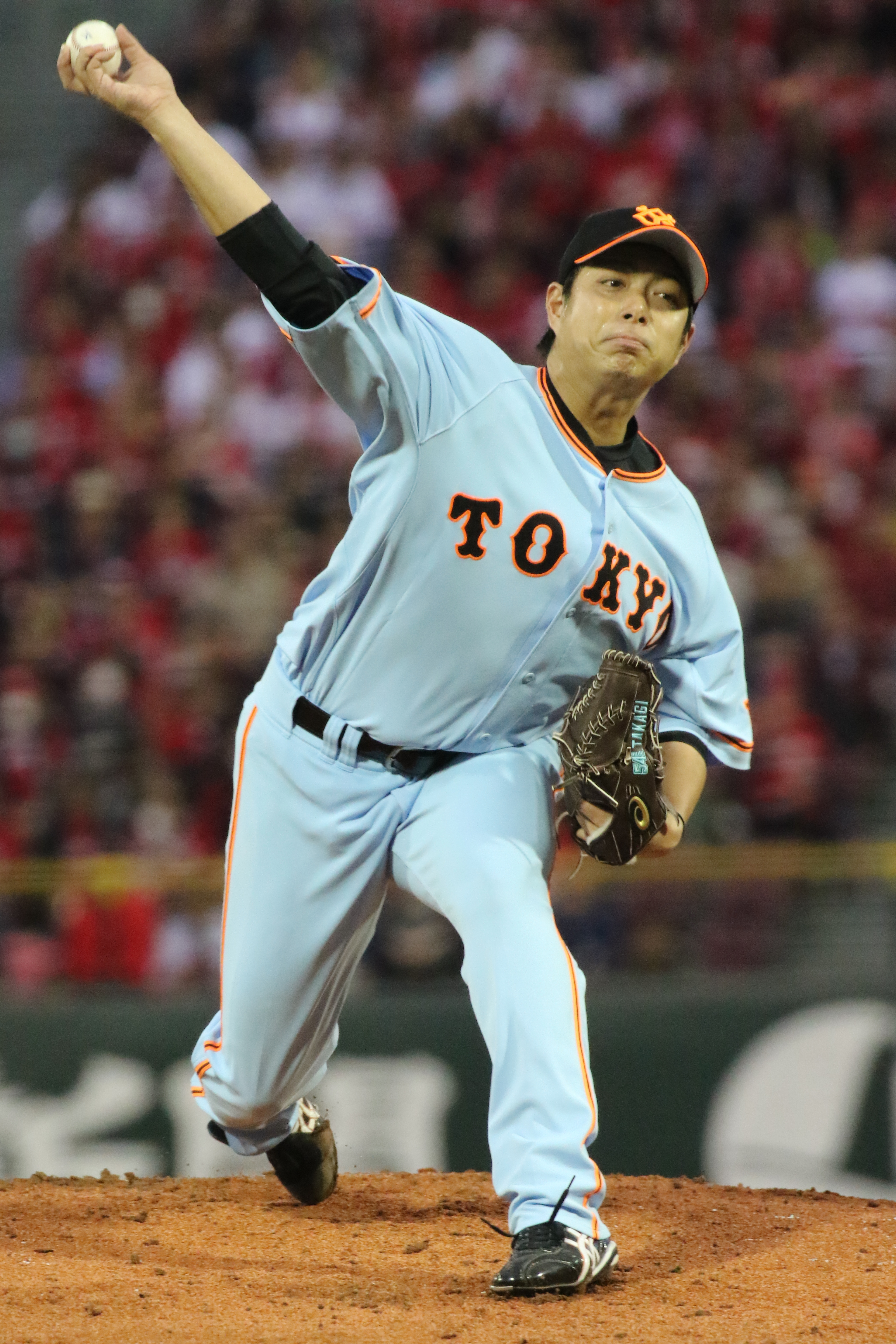 ジャイアンツ高木選手